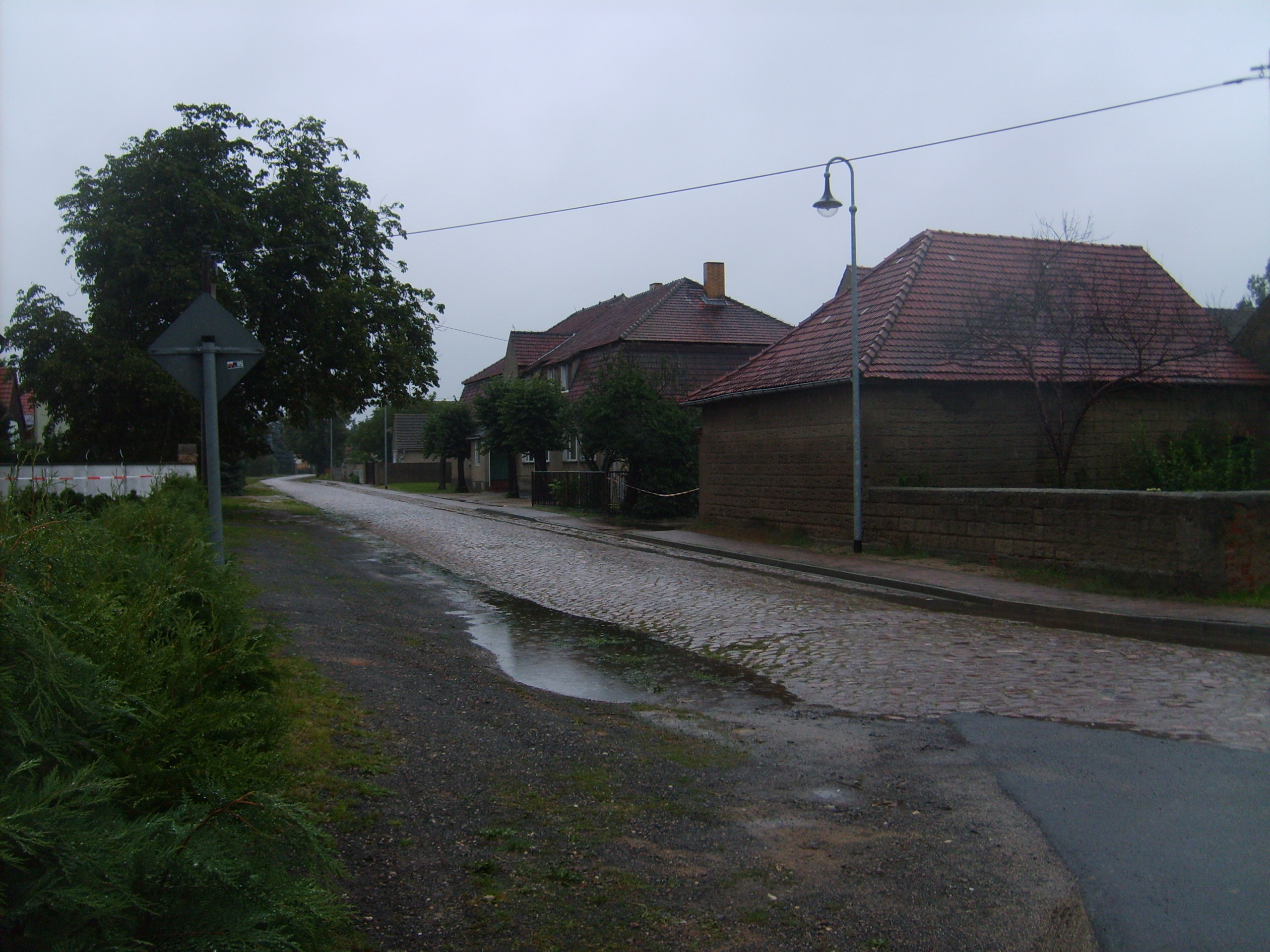 Dorfstraße in Kauxdorf.